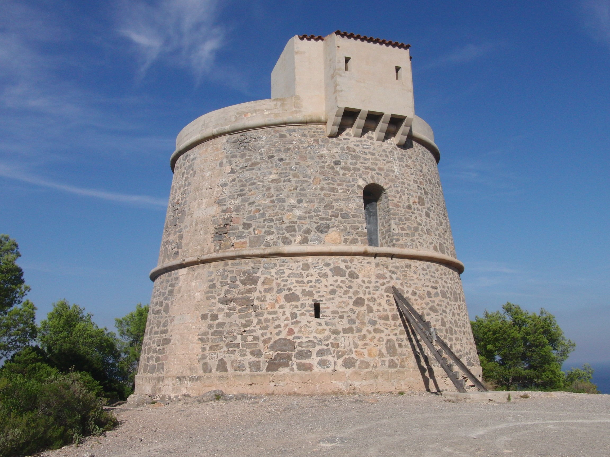 Verteidigungsturm 'Torre d'en Valls, Santa Eulalia del Rio, Ibiza